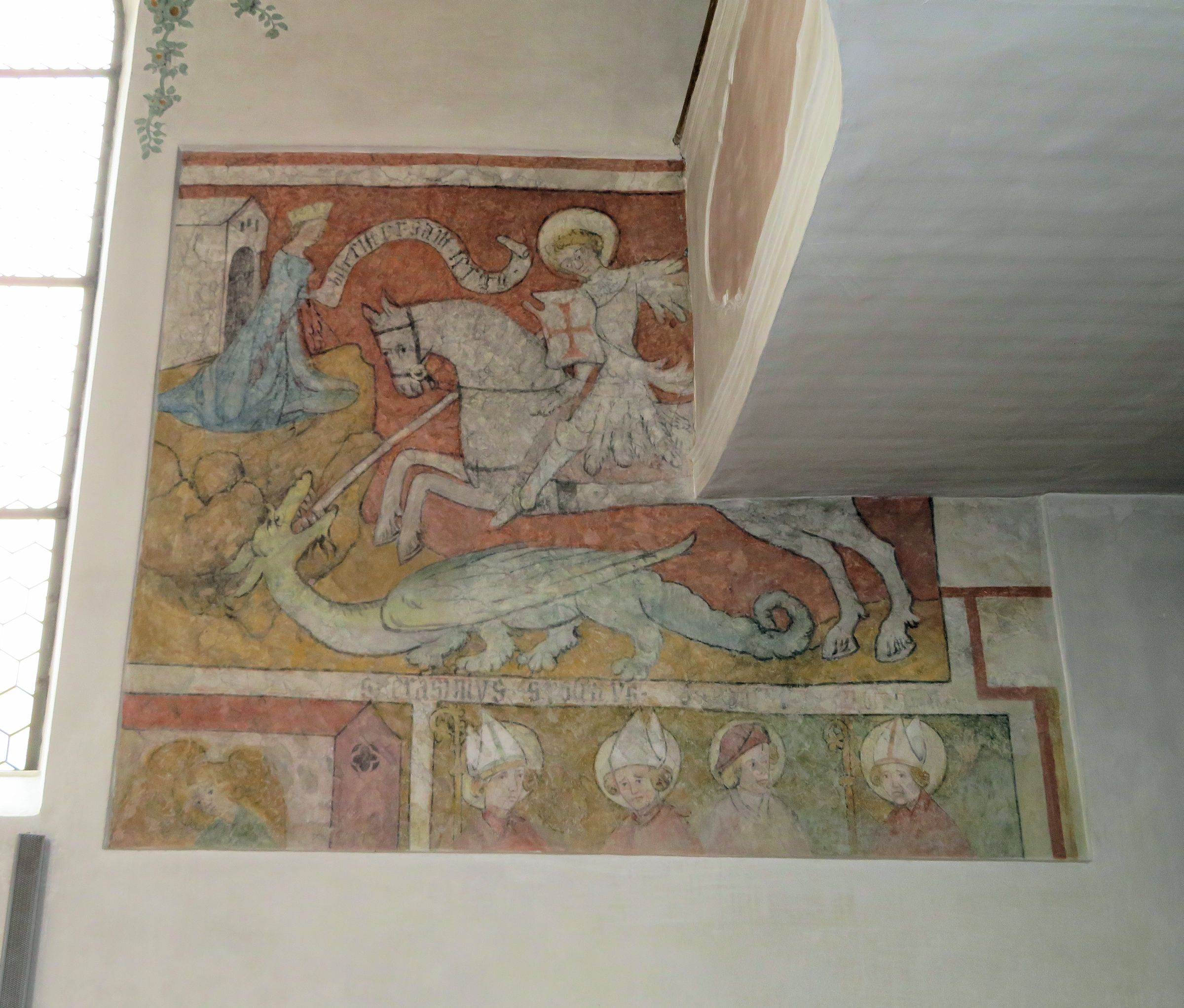 St. Peter und Paul in Hopfen am See ist eine barockisierte Kirche, deren Ursprünge wohl auf das 11. Jh. zurückgehen. Sie enthält gotische Fresken und Malereien von Claudius Schraudolph dem Älteren sowie Stuck von Joseph Fischer aus Faulenbach.